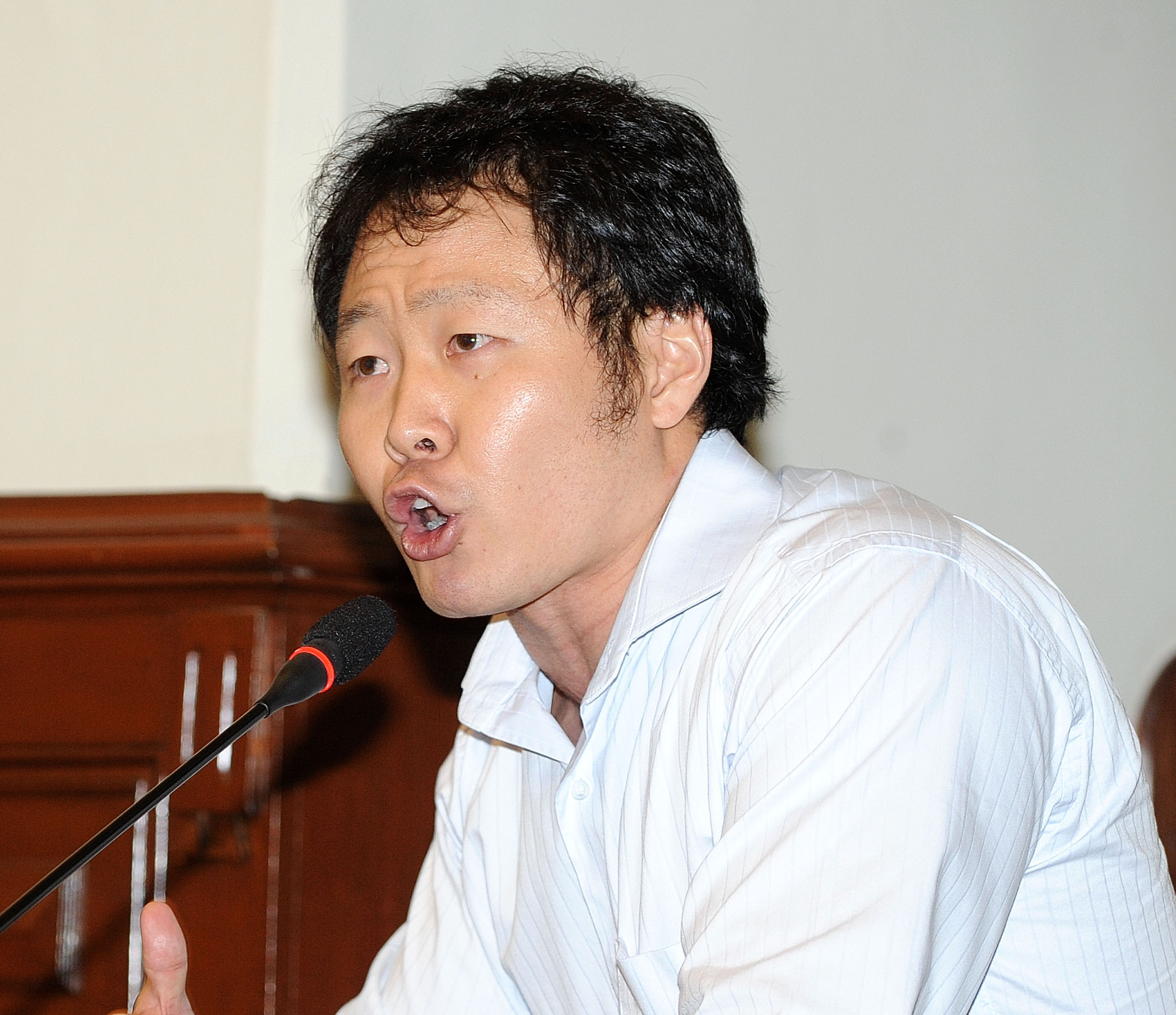 El legislador Kenji Fujimori durante su intervención en el debate parlamentario realizado esta tarde por el Pleno congresal.